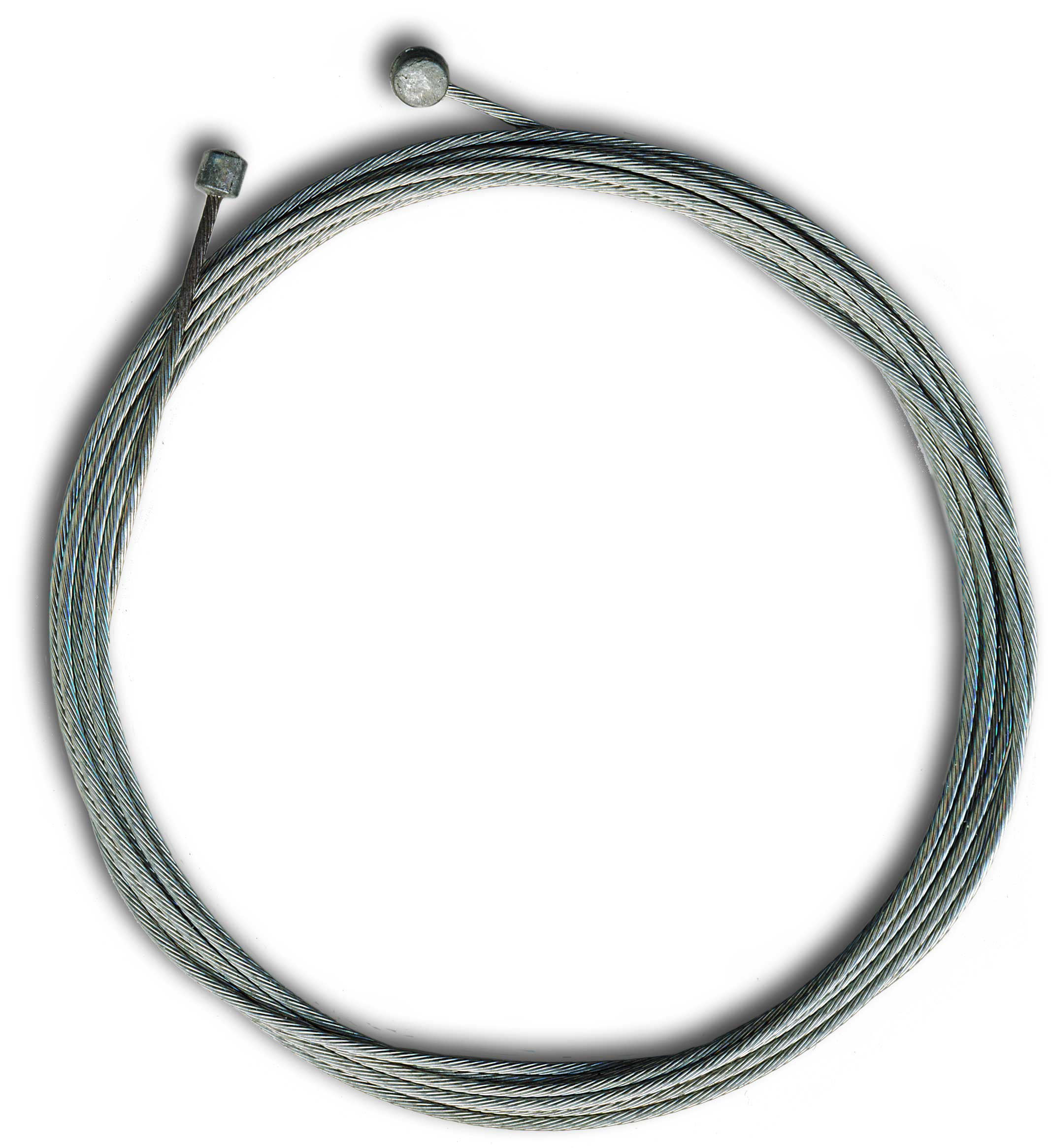 Bowdenzugseele